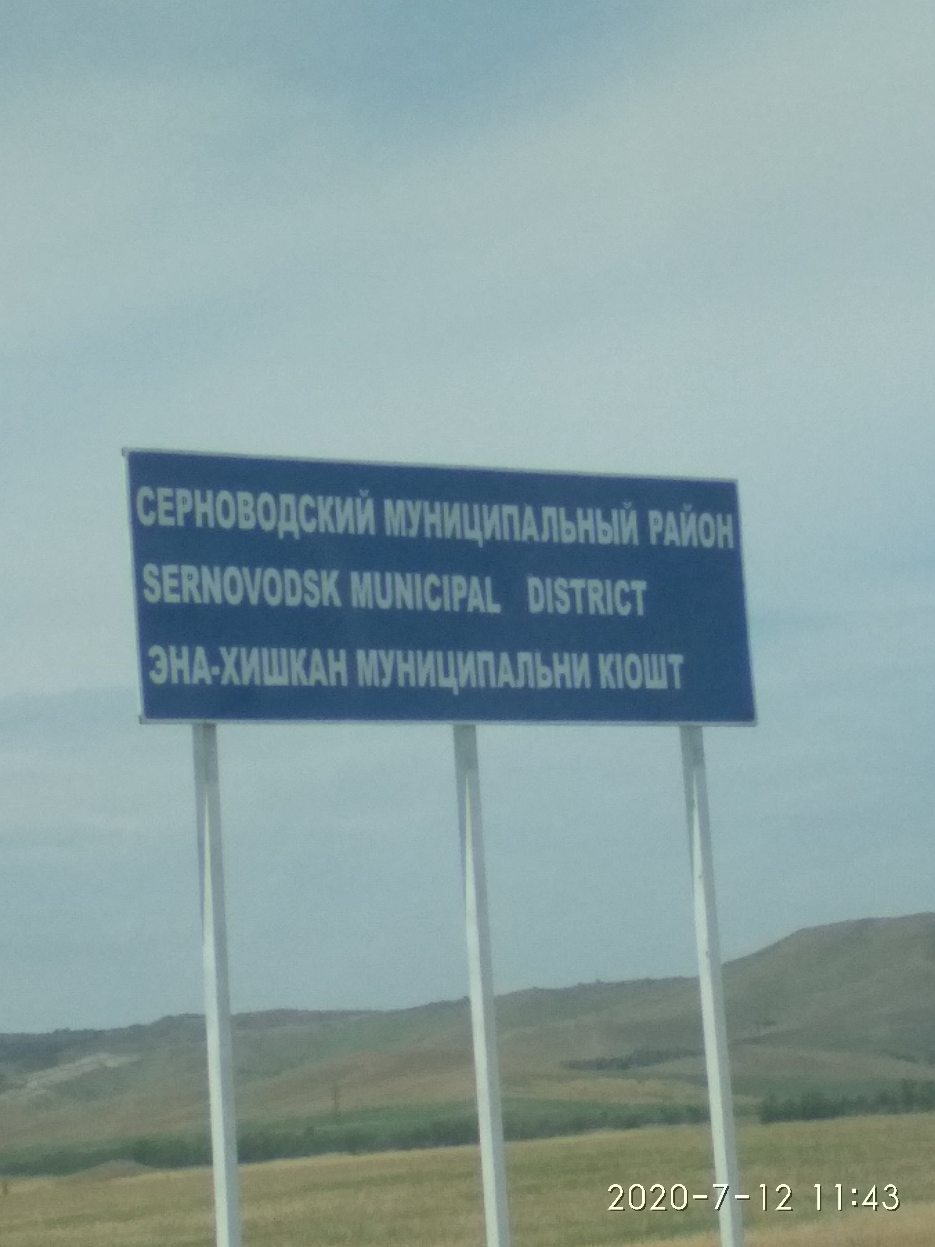 Нохчийн: Эна-Хишкан кӀошт